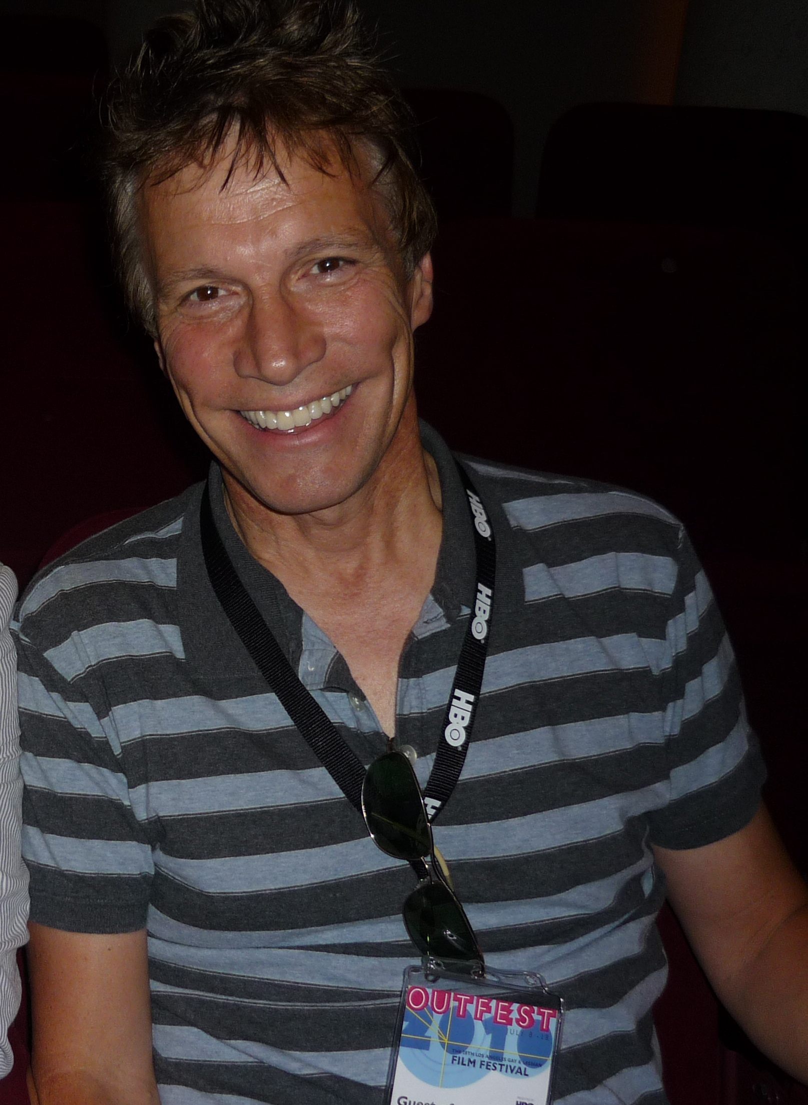 Don Roos